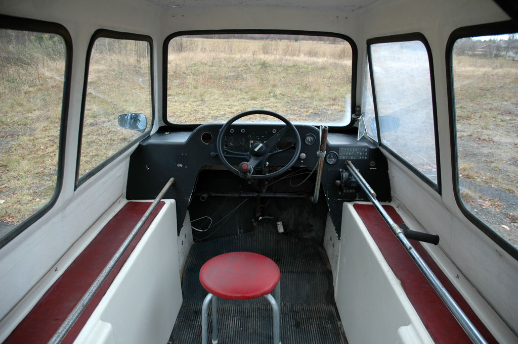 Rolloped inuti, förarplats